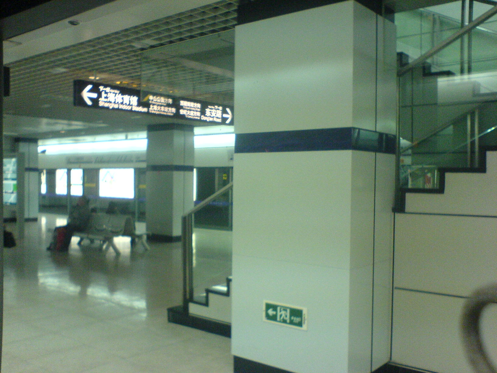 4号线上海体育场站站台